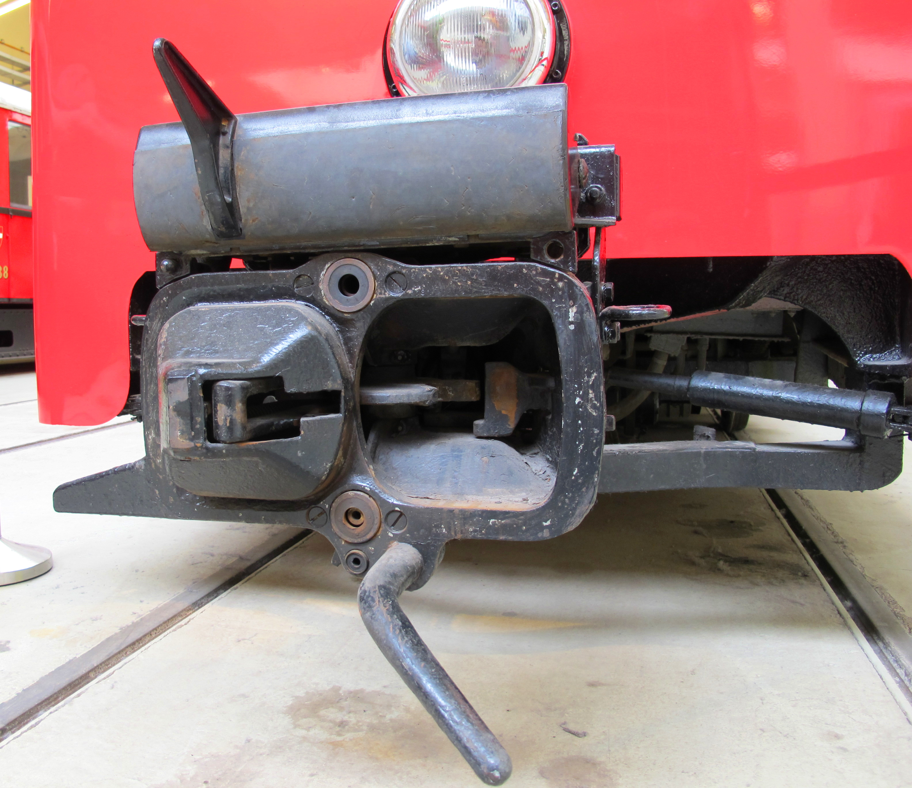 Wiener Straßenbahnmuseum - Scharfenbergkupplung Stadtbahn N1 Detailaufnahme